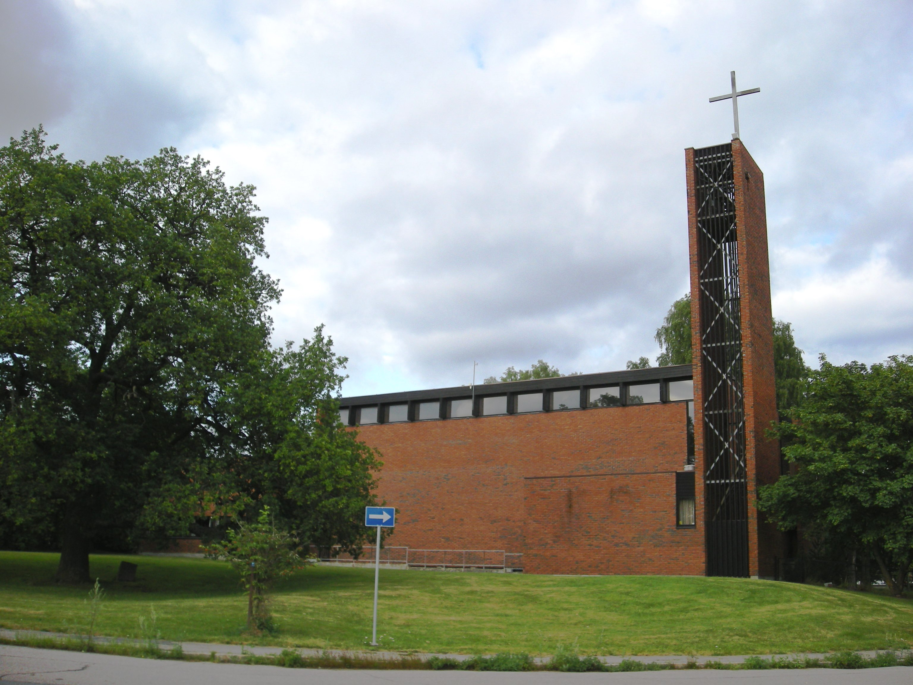 Bredtvet kirke med Bredtvetveien foran